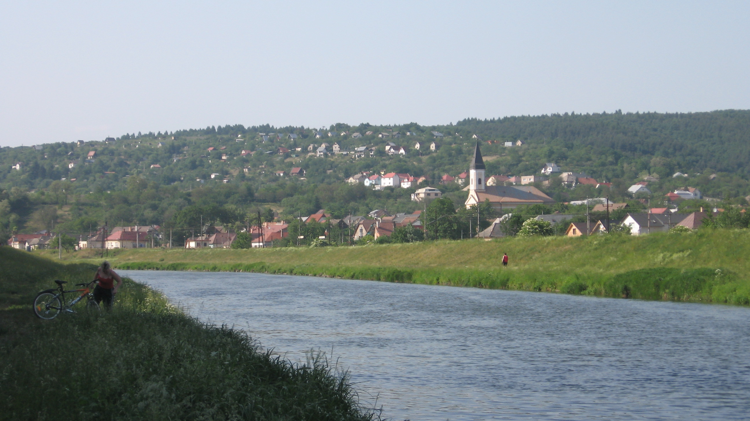 Hernádtihany látképe.